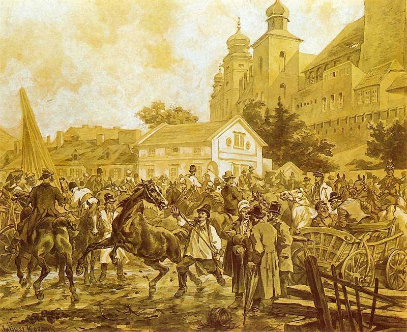 Targ na konie pod Wawelem Ok. 1870. Sepia. 38 x 46 cm. Muzeum Narodowe, Warszawa.